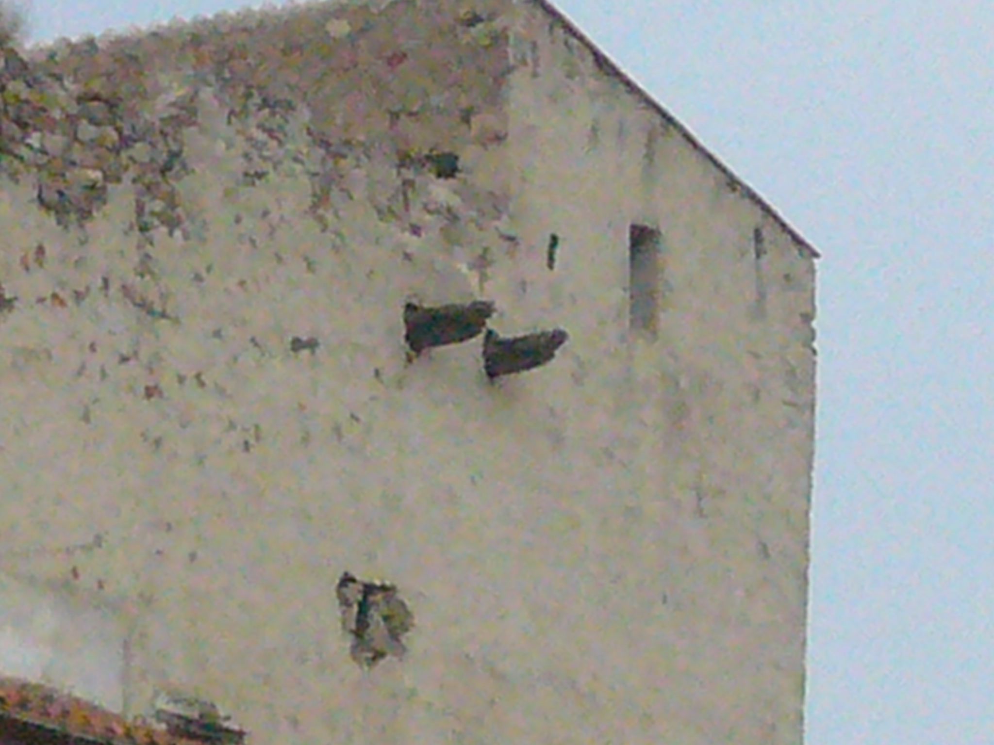 Les poutres du château à l'origine de la légende des canons de Caramany (Pyrénées-Orientales, France)